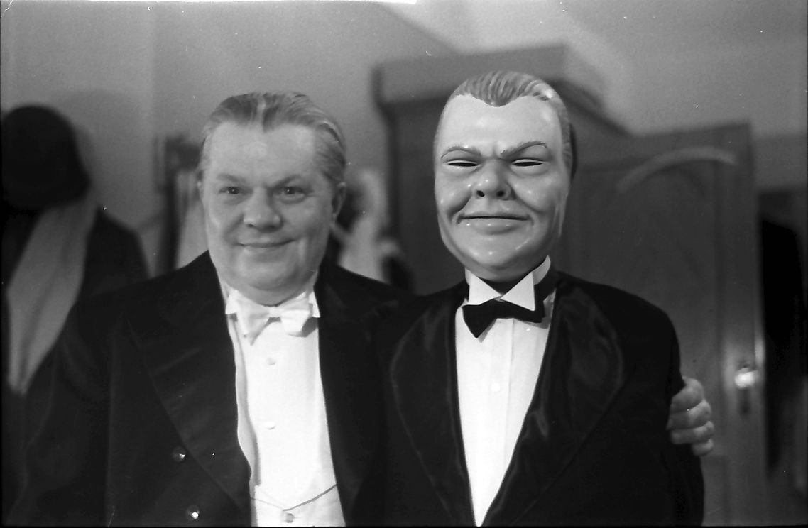 Kabarett der Komiker; Willi Schaeffers und Lene Ludwig mit Maske Willi Schaeffers’